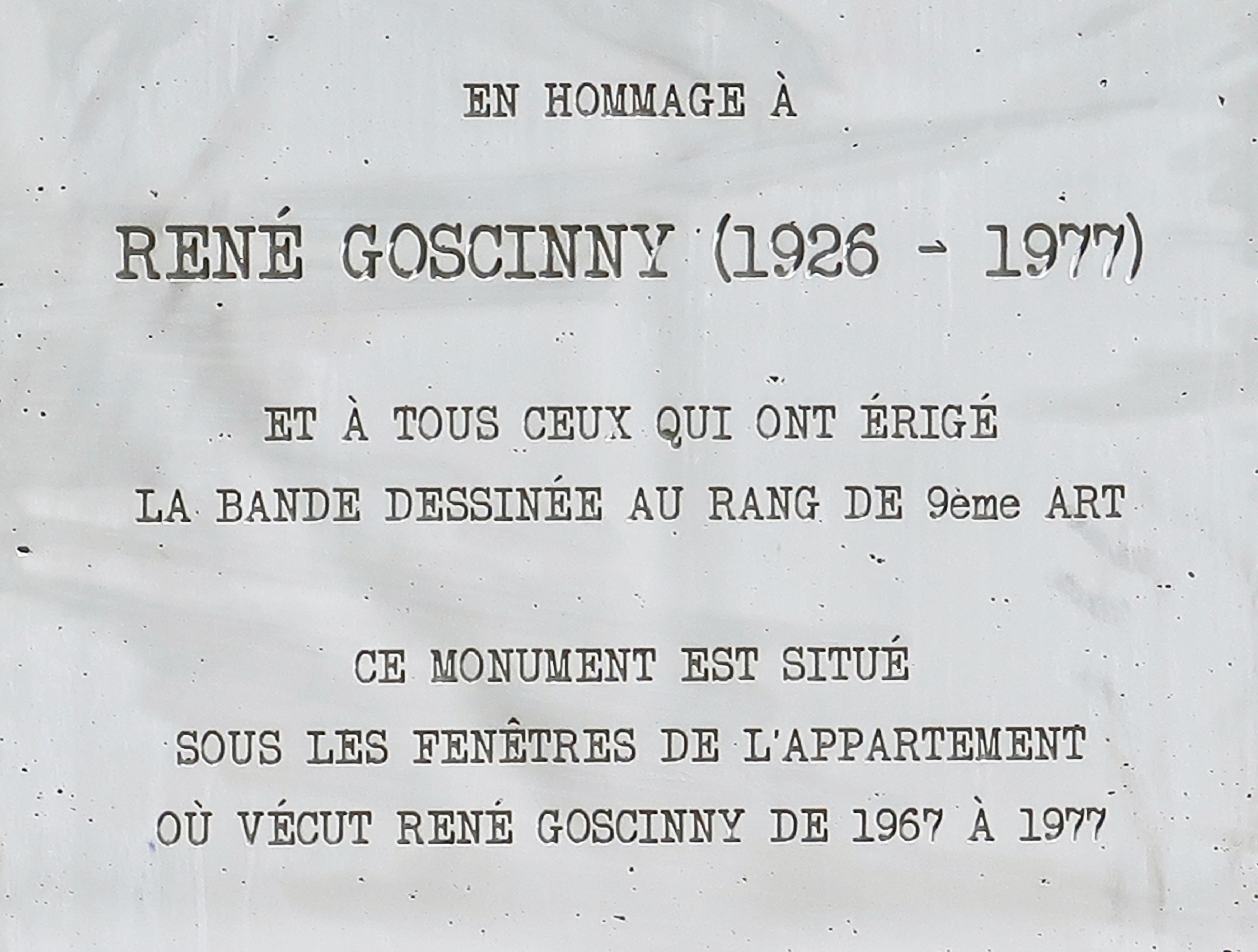 Inscription sur le socle de la statue de René Goscinny, dans le jardin de la gare de Boulainvilliers, le long de la rue de Boulainvilliers (Paris, 16e).